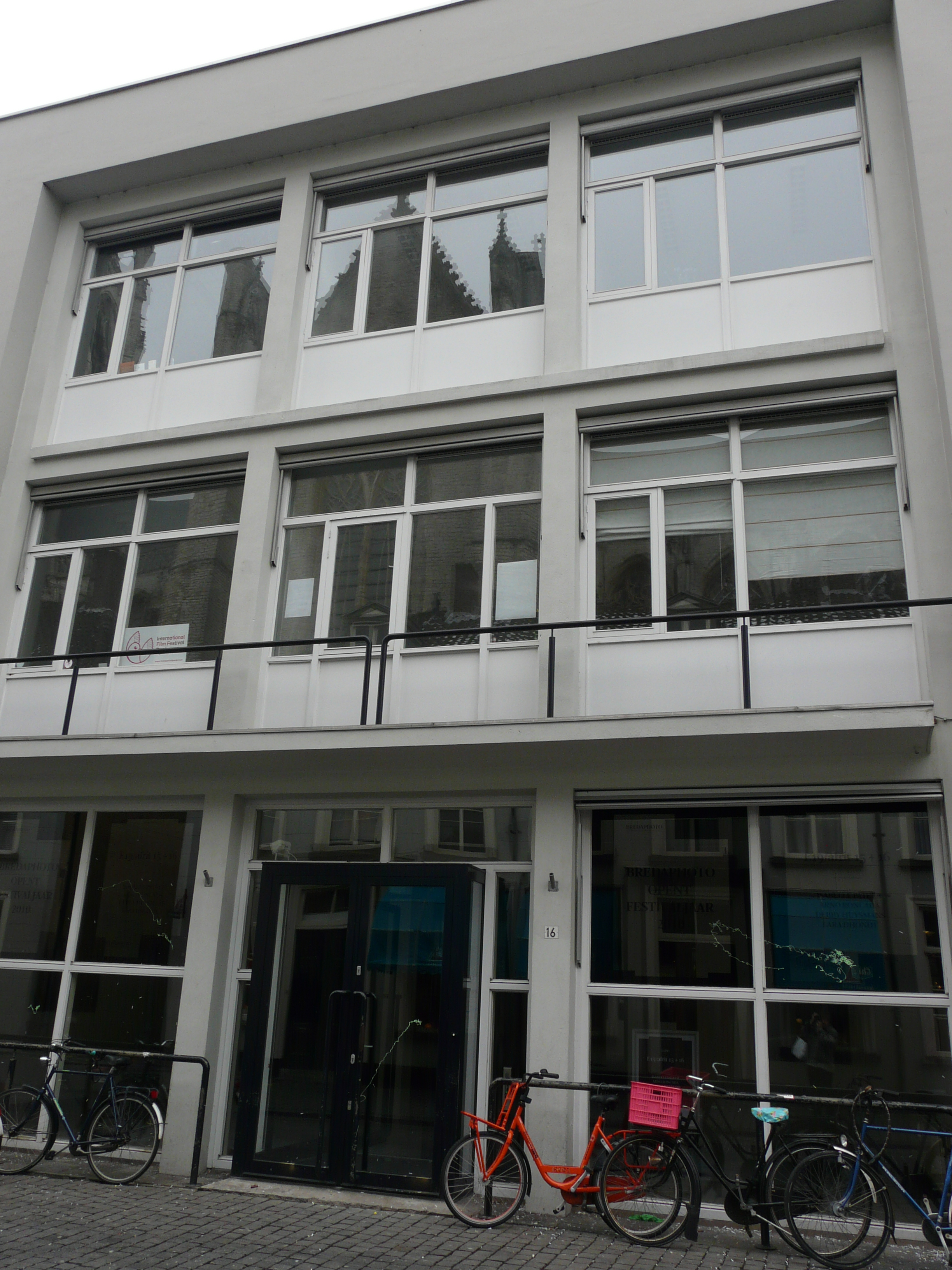 Zicht op voormalig Gebouw C in de Reigerstraat 16 in Breda Centrum